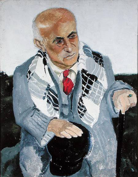 Christopher Wood, Portrait de Max Jacob, huile sur carton, 80,5x64, Musée des Beaux Arts de Quimper